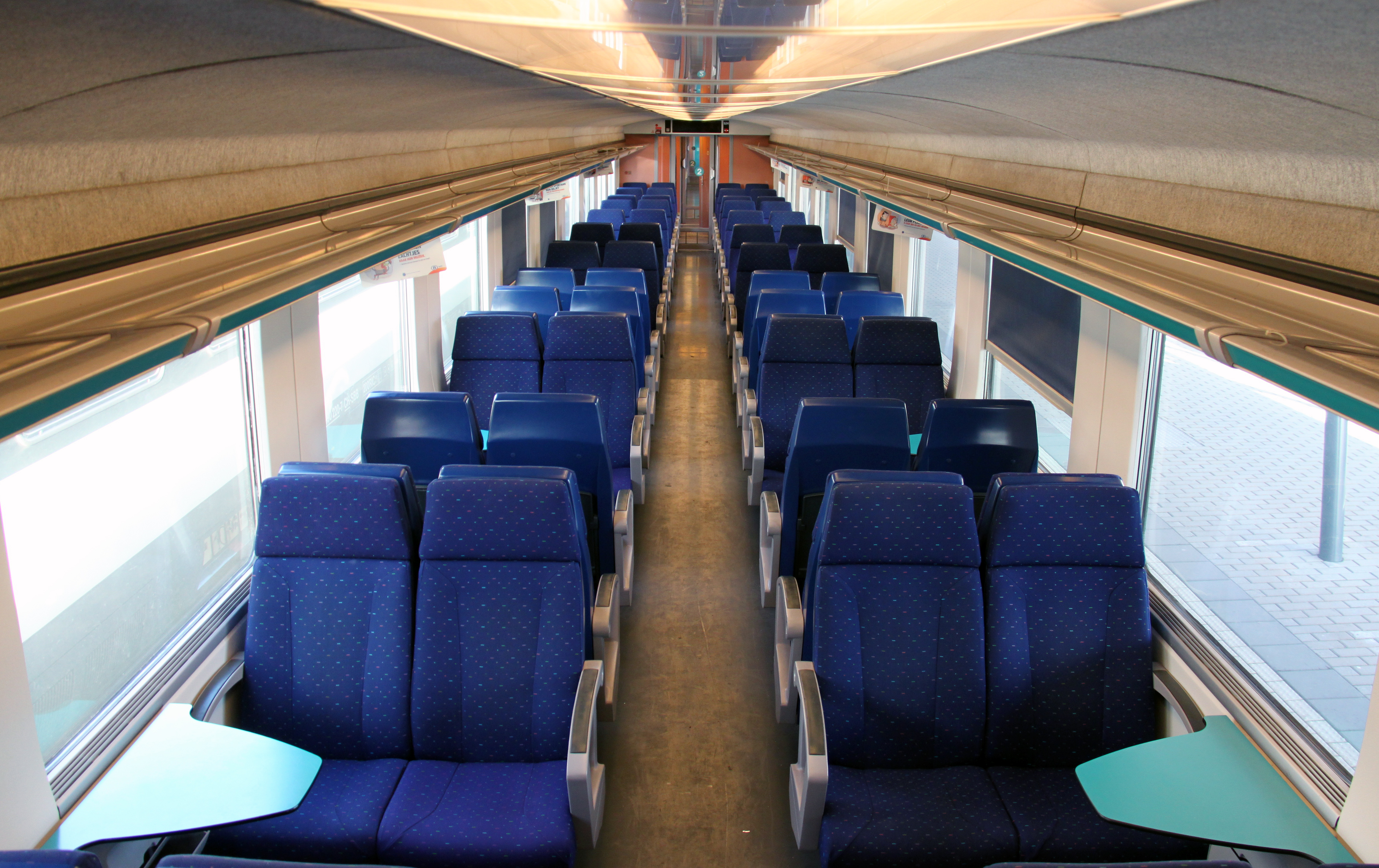 Interieur tweede klasse van een treinstel MS96 van de NMBS.